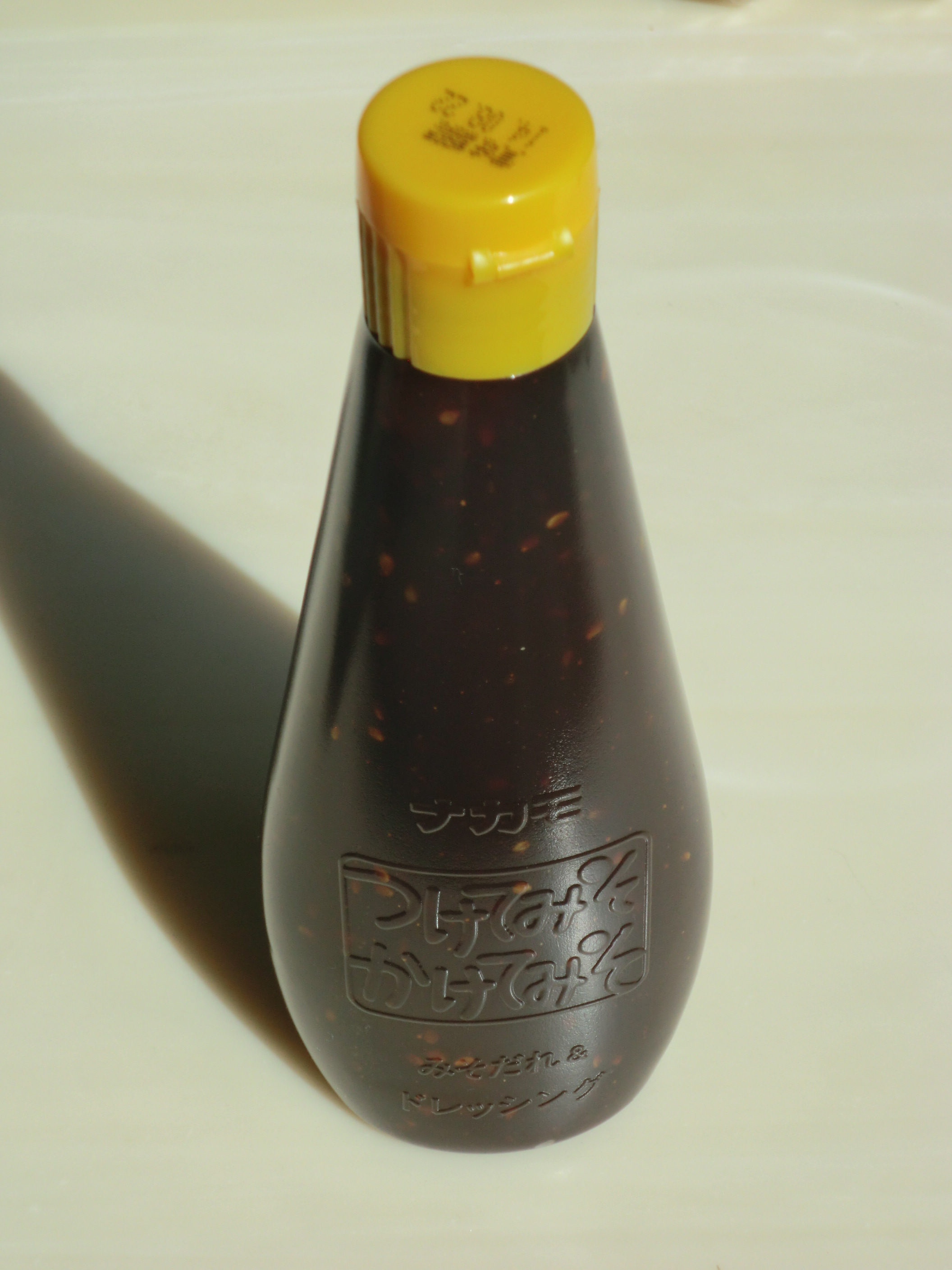 愛知県の食品メーカー、ナカモが製造する「つけてみそかけてみそ」です。